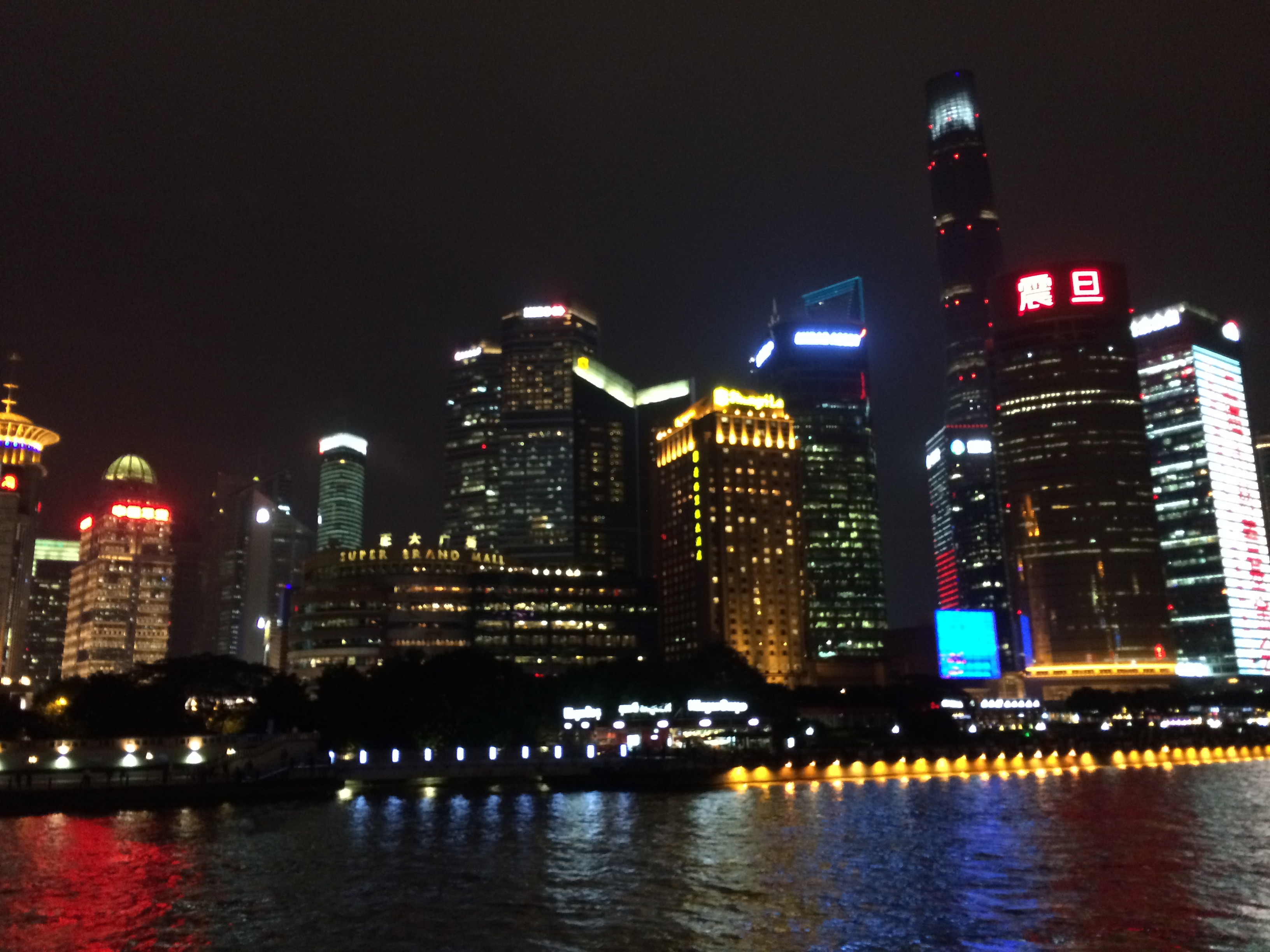 유람선에서 바라본 스카이라인의 풍경.